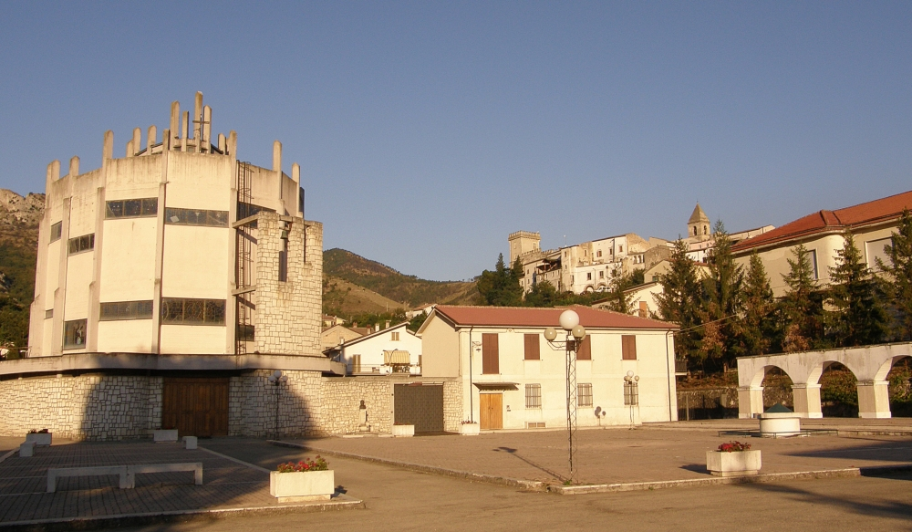 Bussi sul Tirino